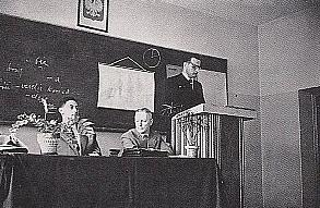 Obrona doktoratu mgr F. Pluty w V 1961 r